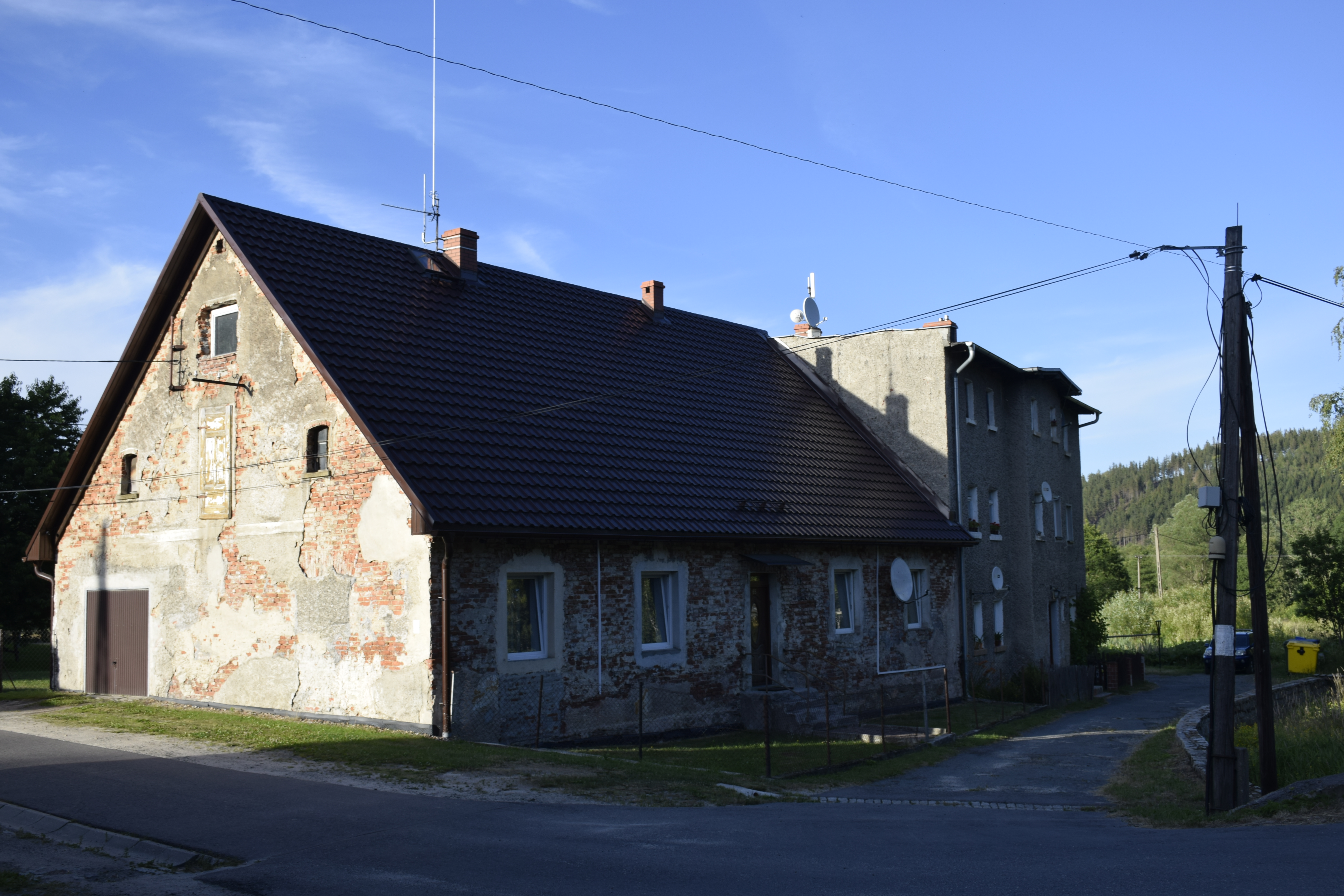 Ogorzelec (powiat kamiennogórski). Polska